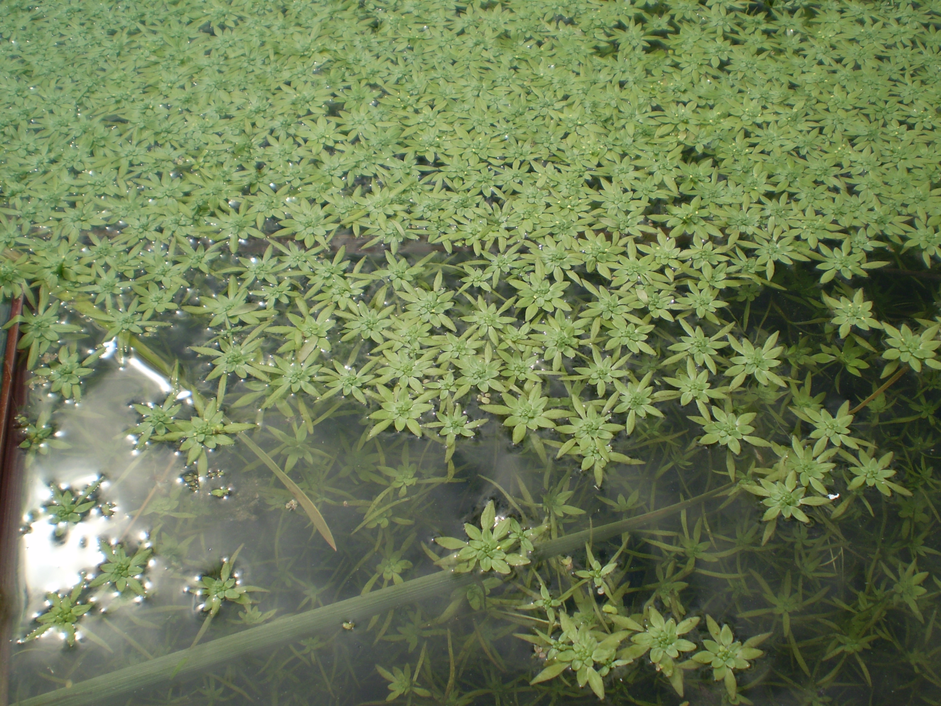 Callitriche cophocarpa (hvězdoš mnohotvarý) - Praha, Modřanské laguny